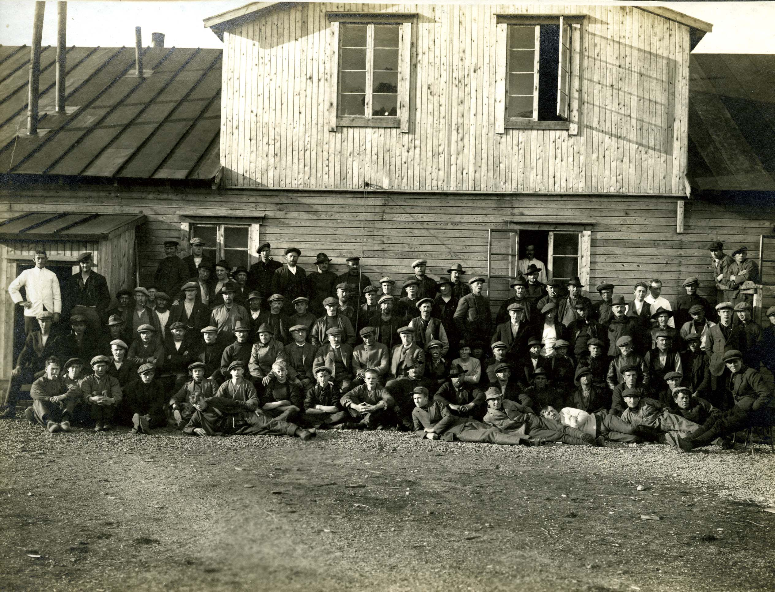 Arbeidsstyrken sommeren 1918. Arkivref.: PA-1632D1_2_15 Foto: Sigvald Moa